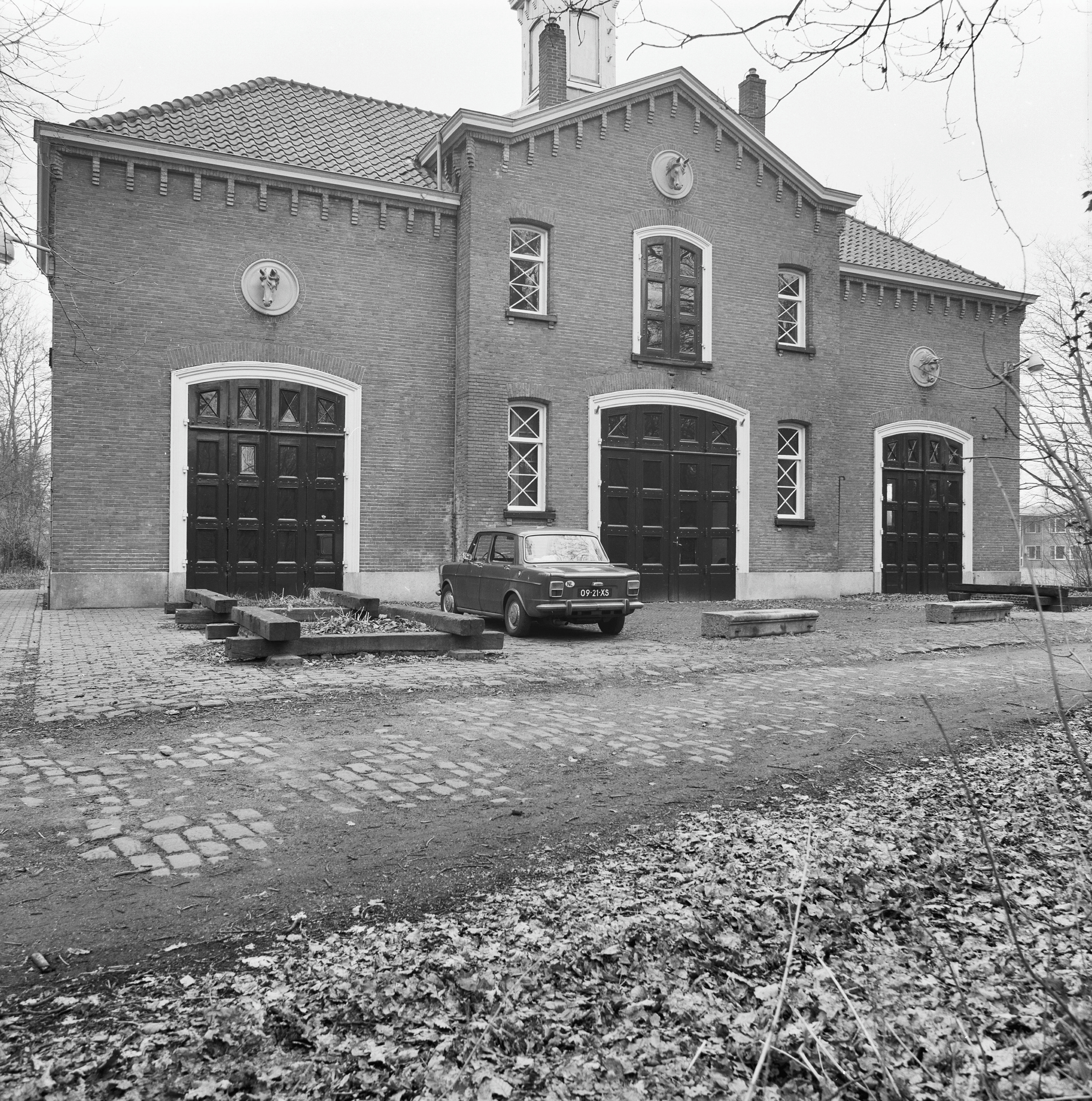 Slot Oud Poelgeest: koetshuis, voorgevel